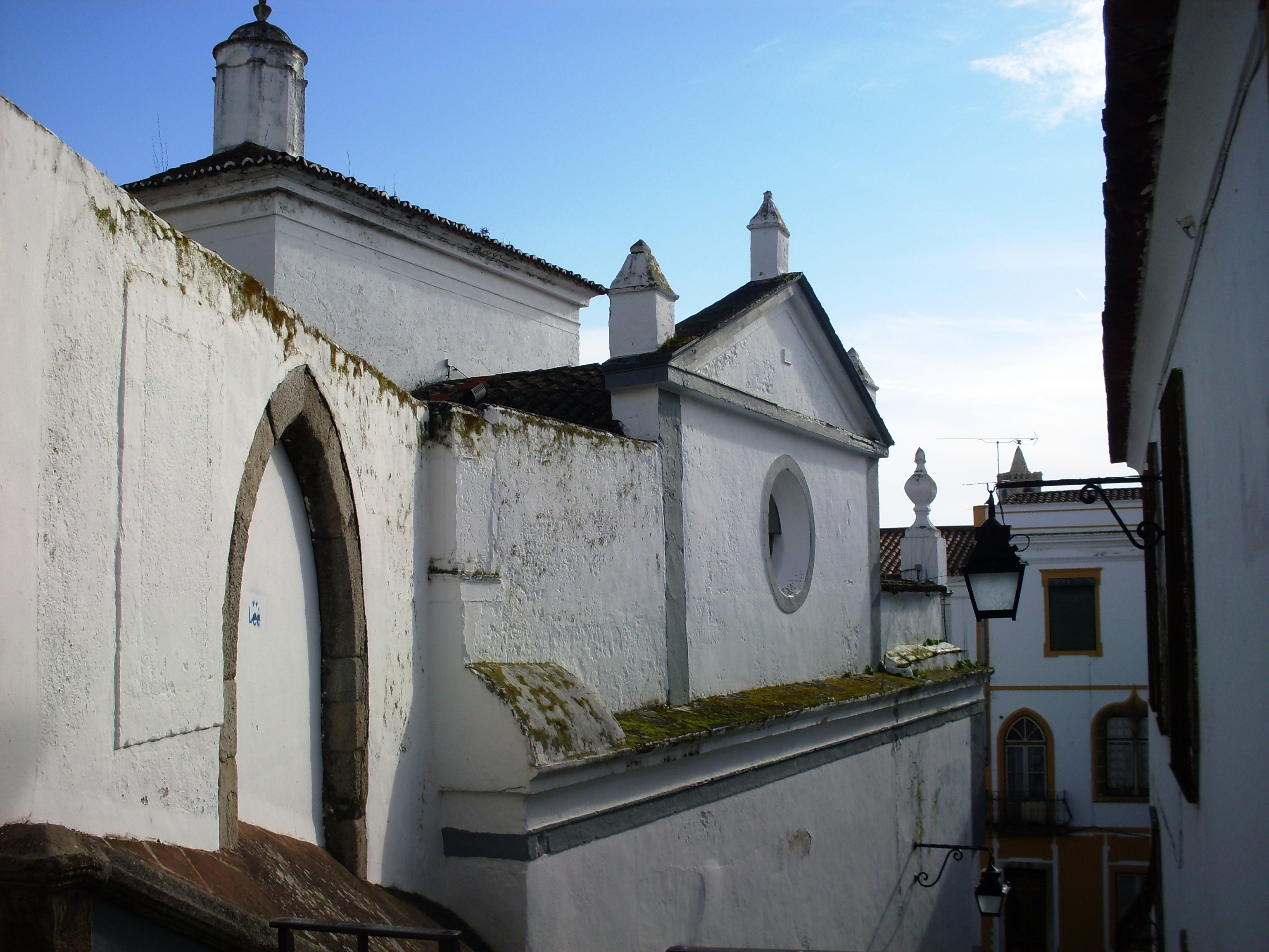 Igreja de São Vicente, Évora, vista da Rua de Valdevinos